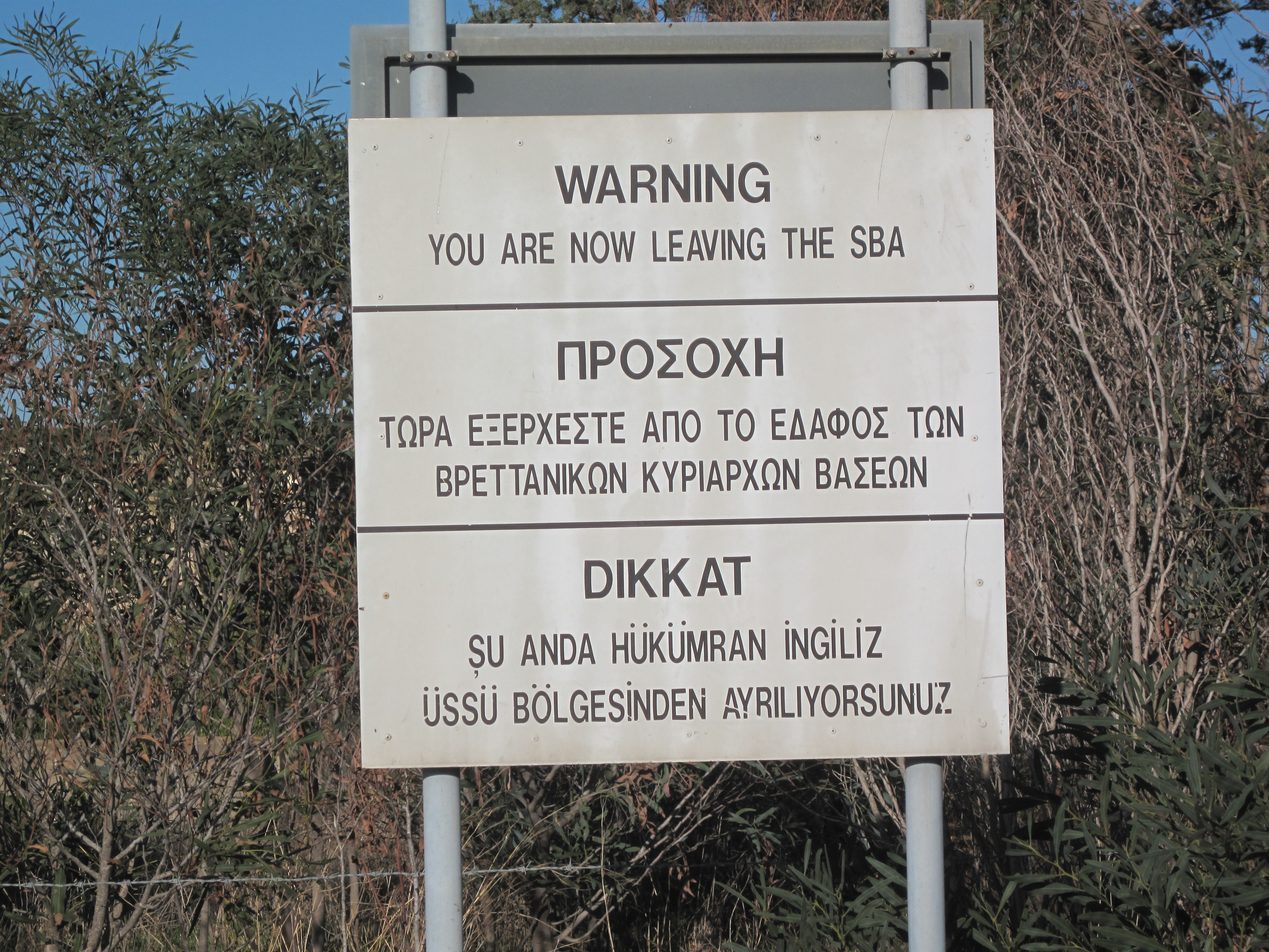 SBA bord